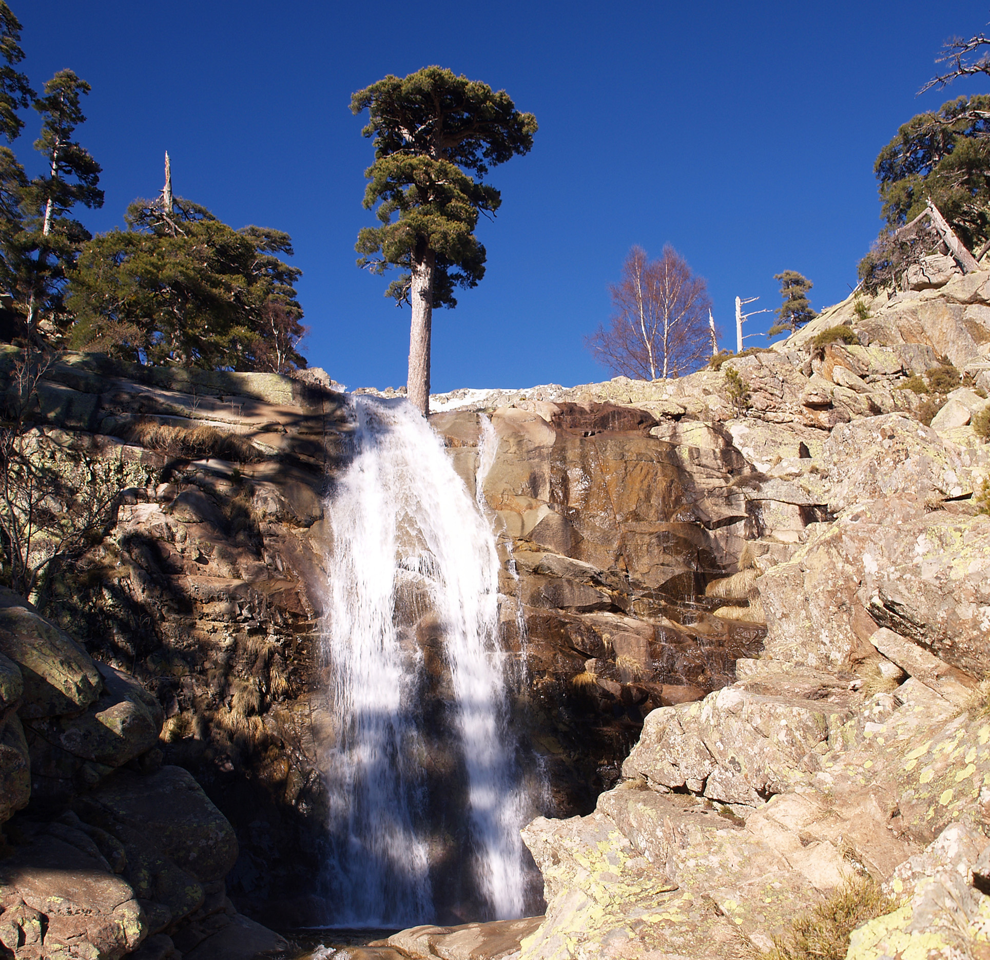 Albertacce - Cascade de Radule (le Golo à 1346m)